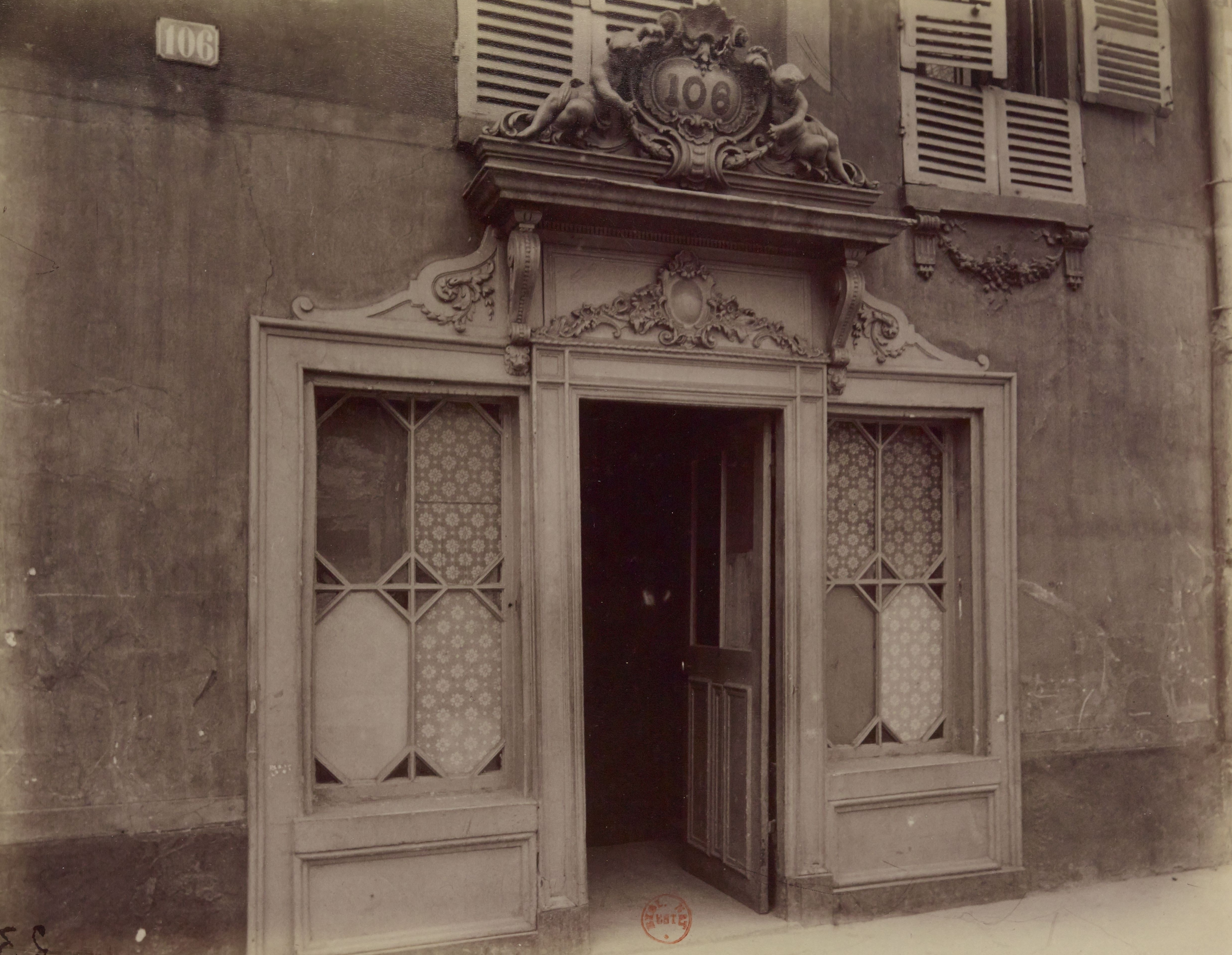 Maison close : 106 [cent six] avenue de Suffren, Paris.